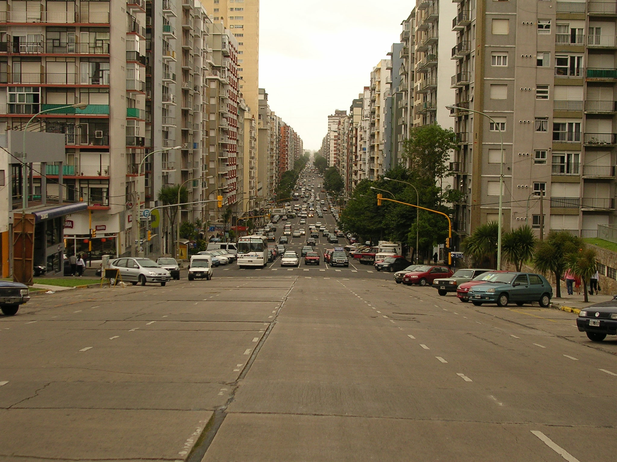 Calle en Mar del Plata (Argentina)